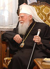 Maxim of Bulgaria